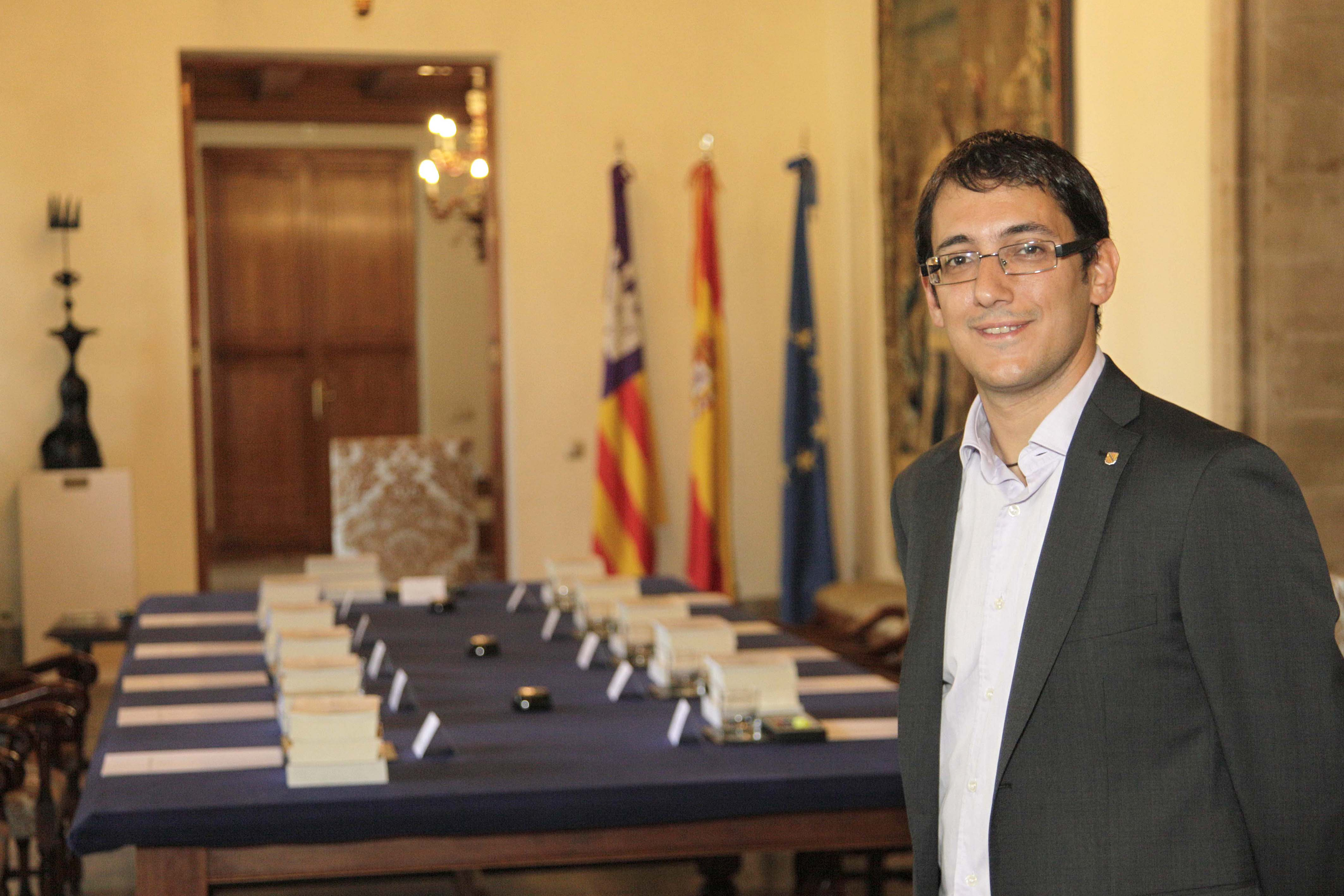 Iago Negueruela, político balear de orixe galega. Conselleiro de Traballo, Comercio e Industria do Goberno Balear